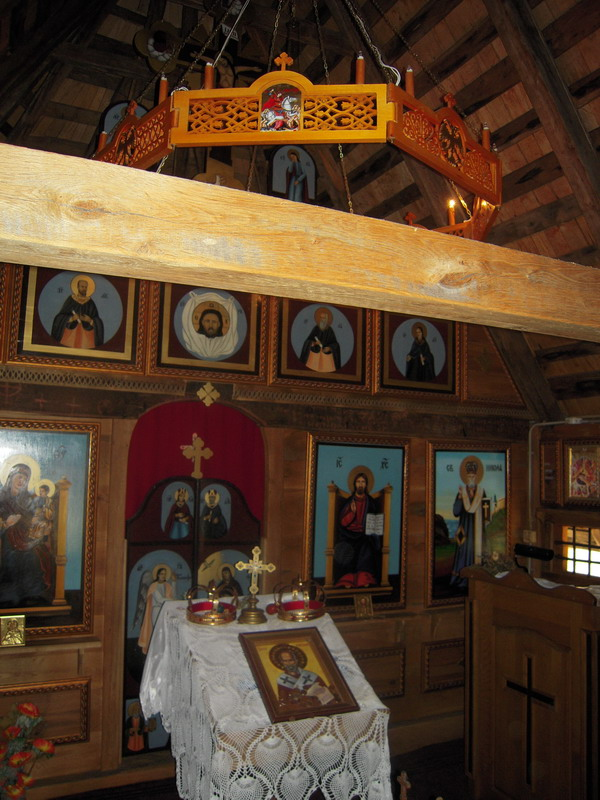 Unutrašnjost_stare_crkve